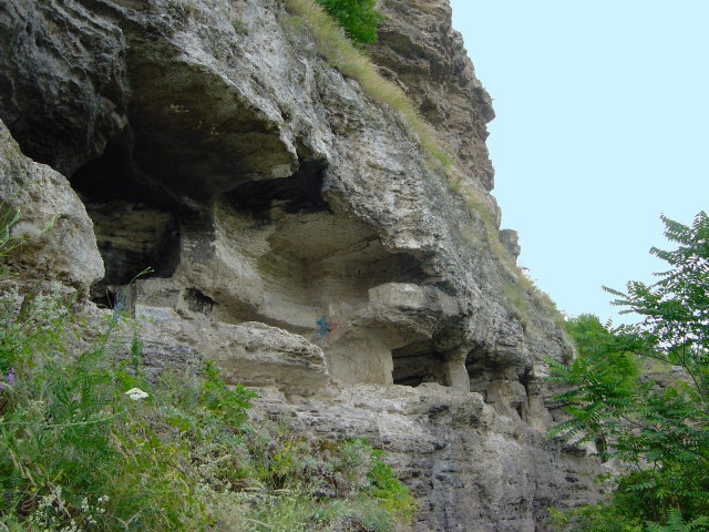 Grottenklooster bij Tipova in Moldavië. Eigen foto Mark Voorendt, juli 2005.